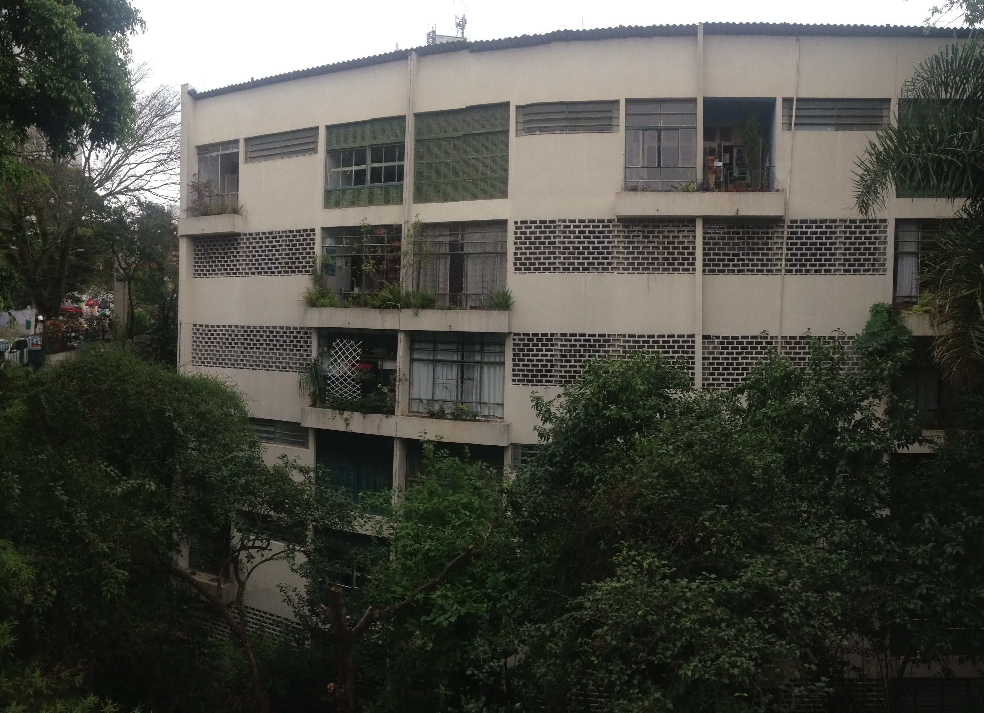 Lateral do edifício Guapira vista de dentro do conjunto.